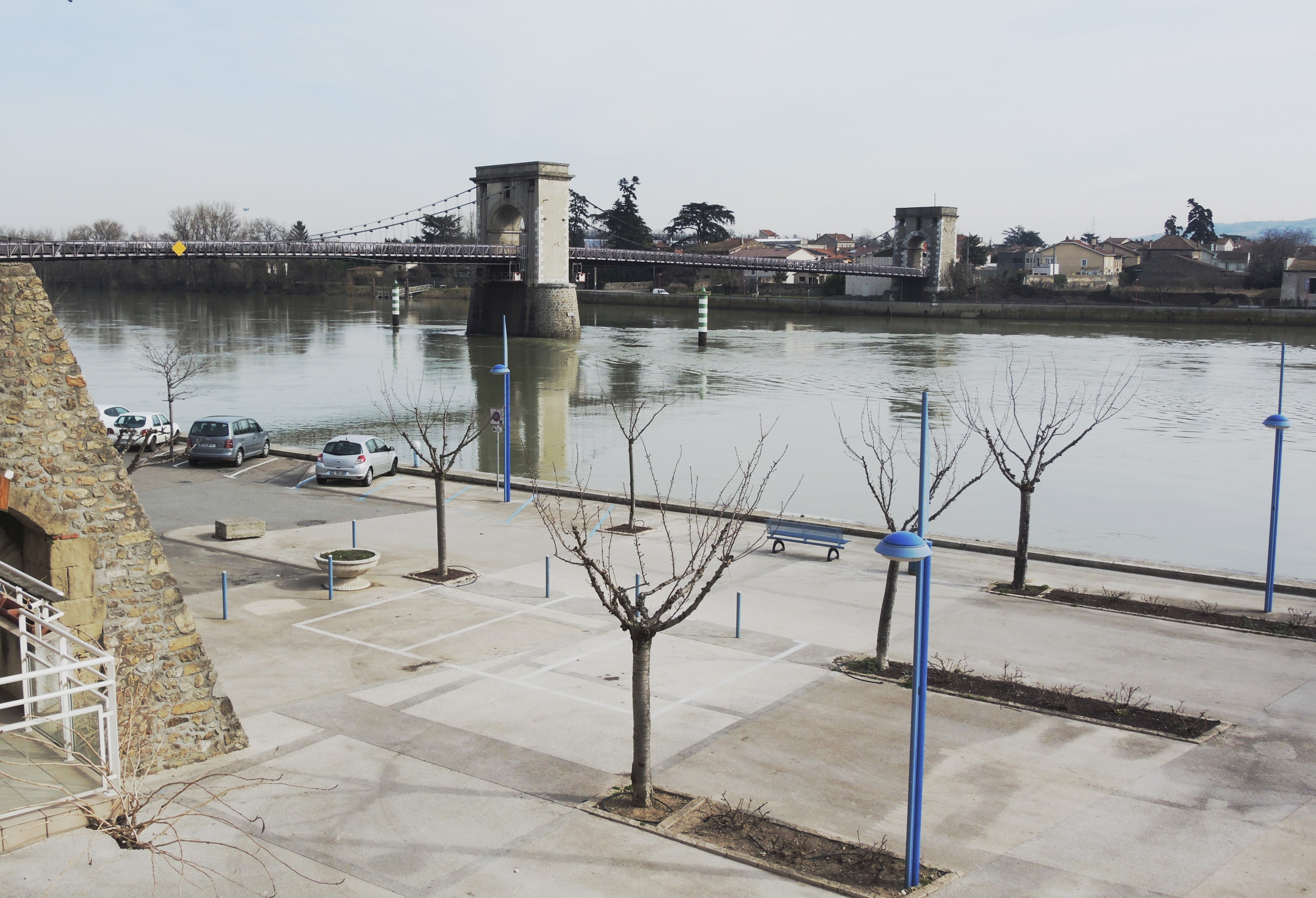 Andance vue générale et détails